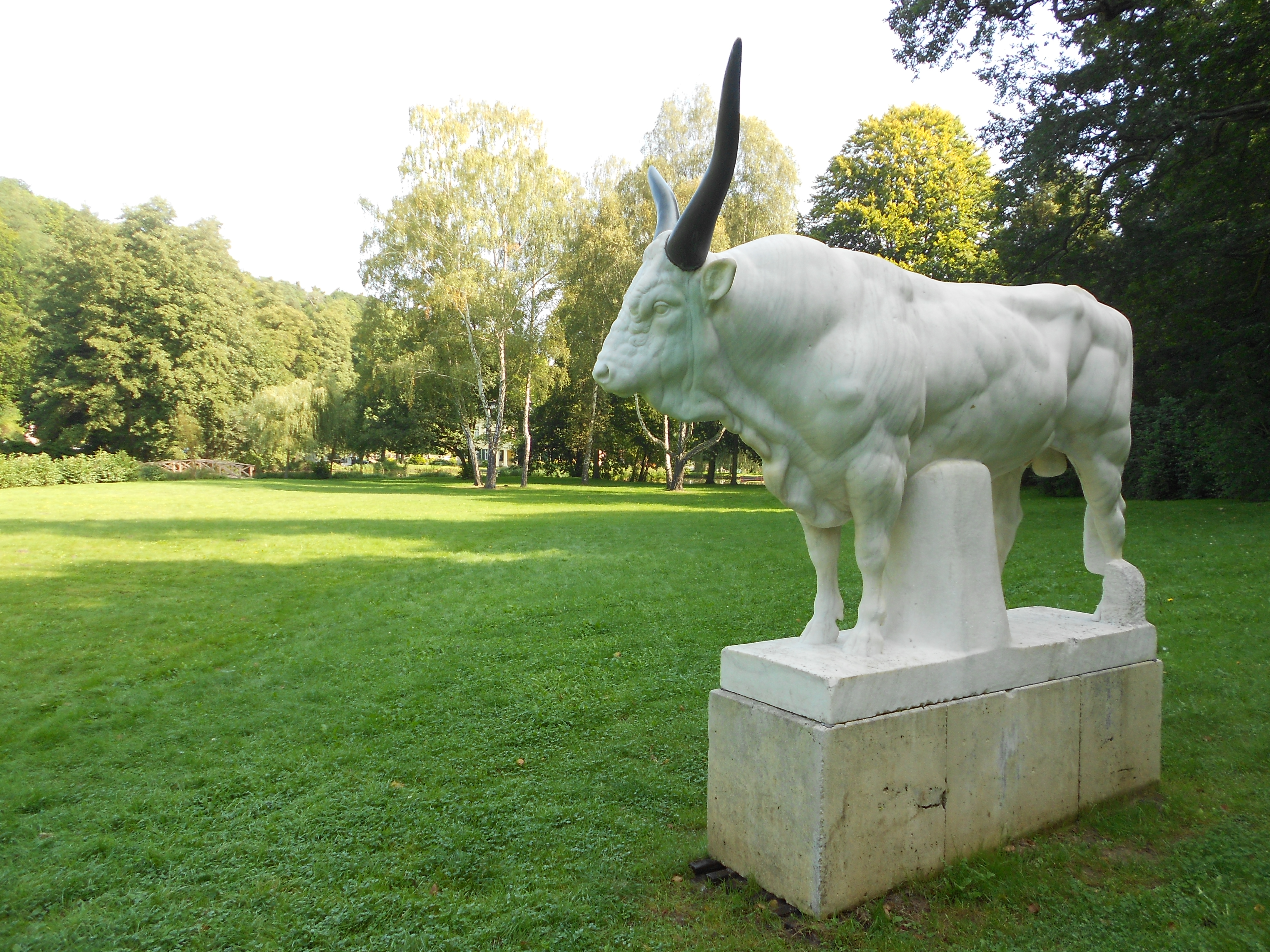 Fachklinik und Moorbad Bad Freienwalde